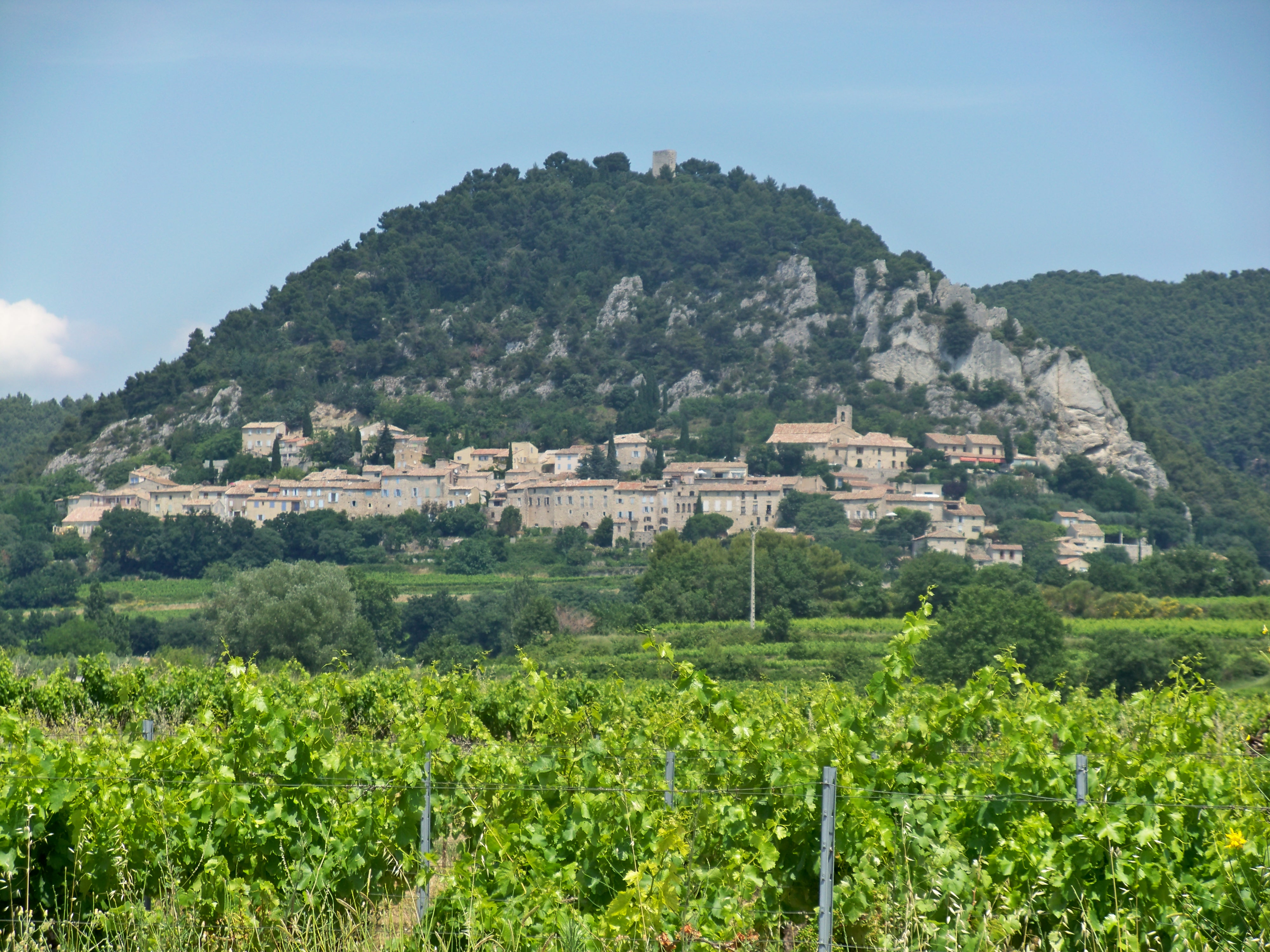 Village de Séguret, Vaucluse, France